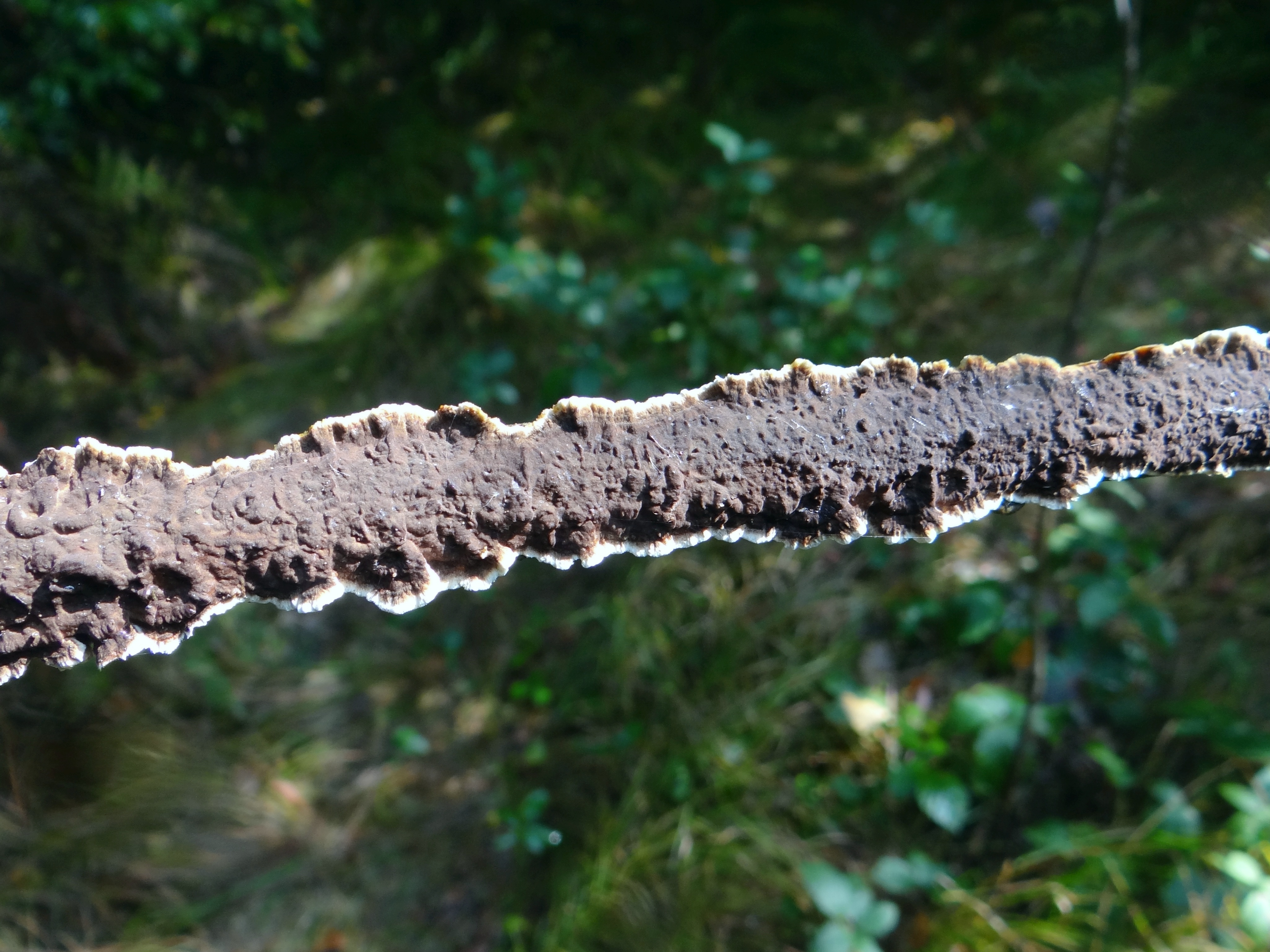 Veluticeps abietina. Location: Poland, Kamionna (województwo małopolskie)